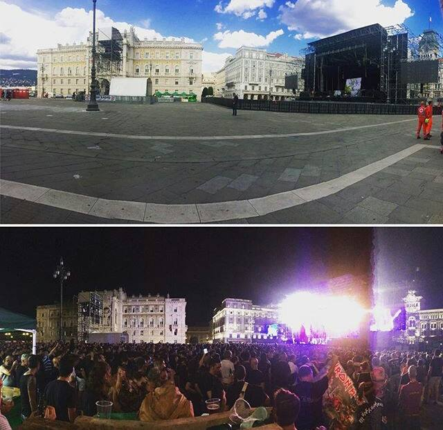 Piazza Unità d'Italia prima e dopo il concerto degli Iron Maiden, 26 luglio 2016